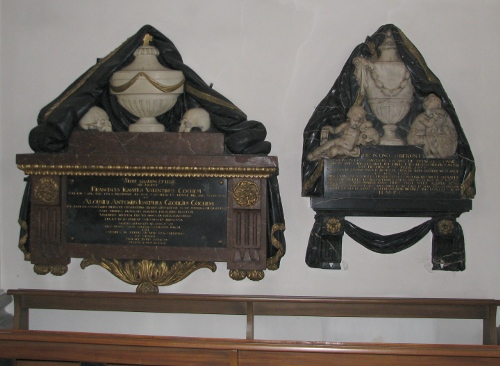 Epitaphe in der St.-Sebastian-Kirche in Mannheim.